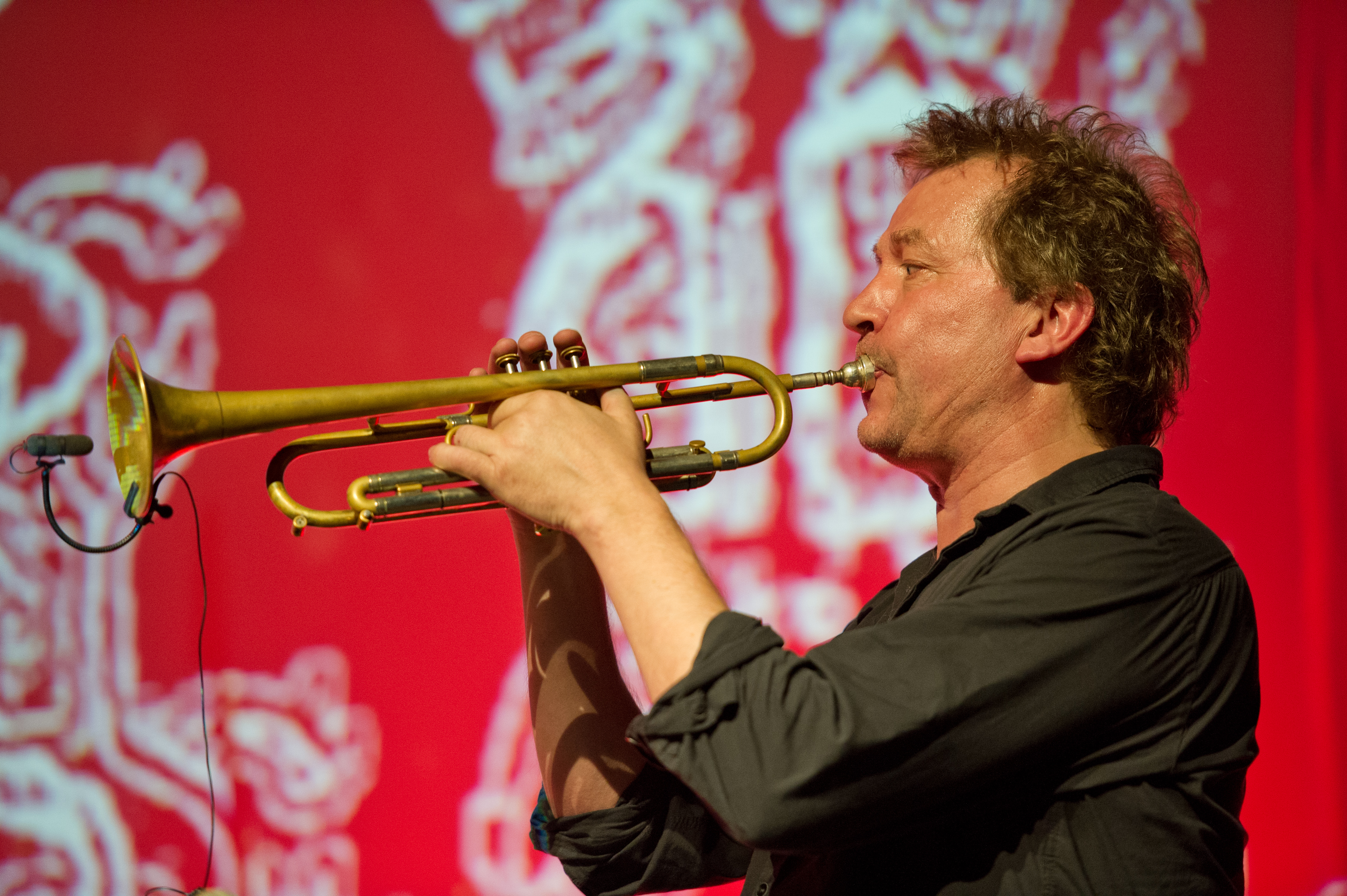 Nils Petter Molvaer in der Centralstation Darmstadt am 14.05.2012